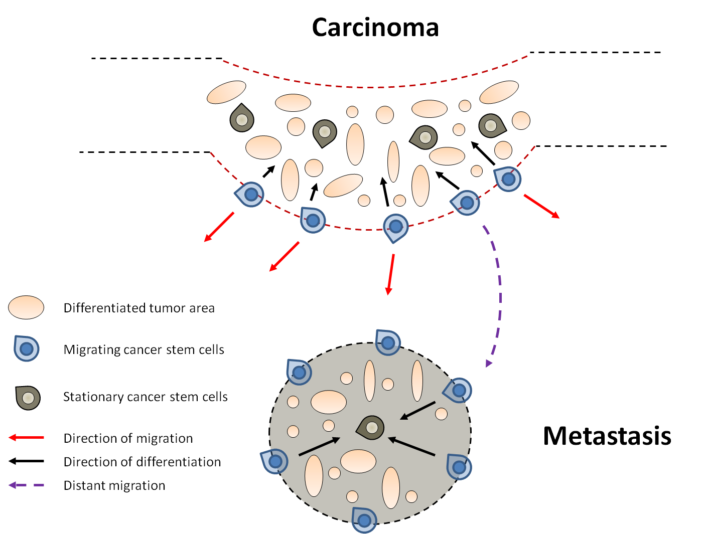 EMT trasition